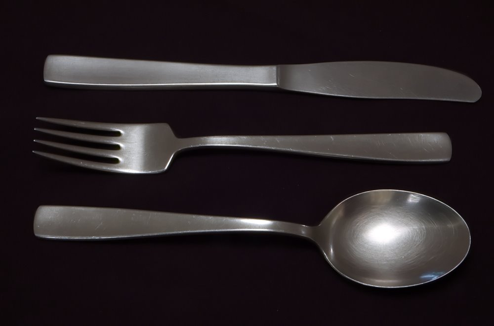 Bild på Facette bestick